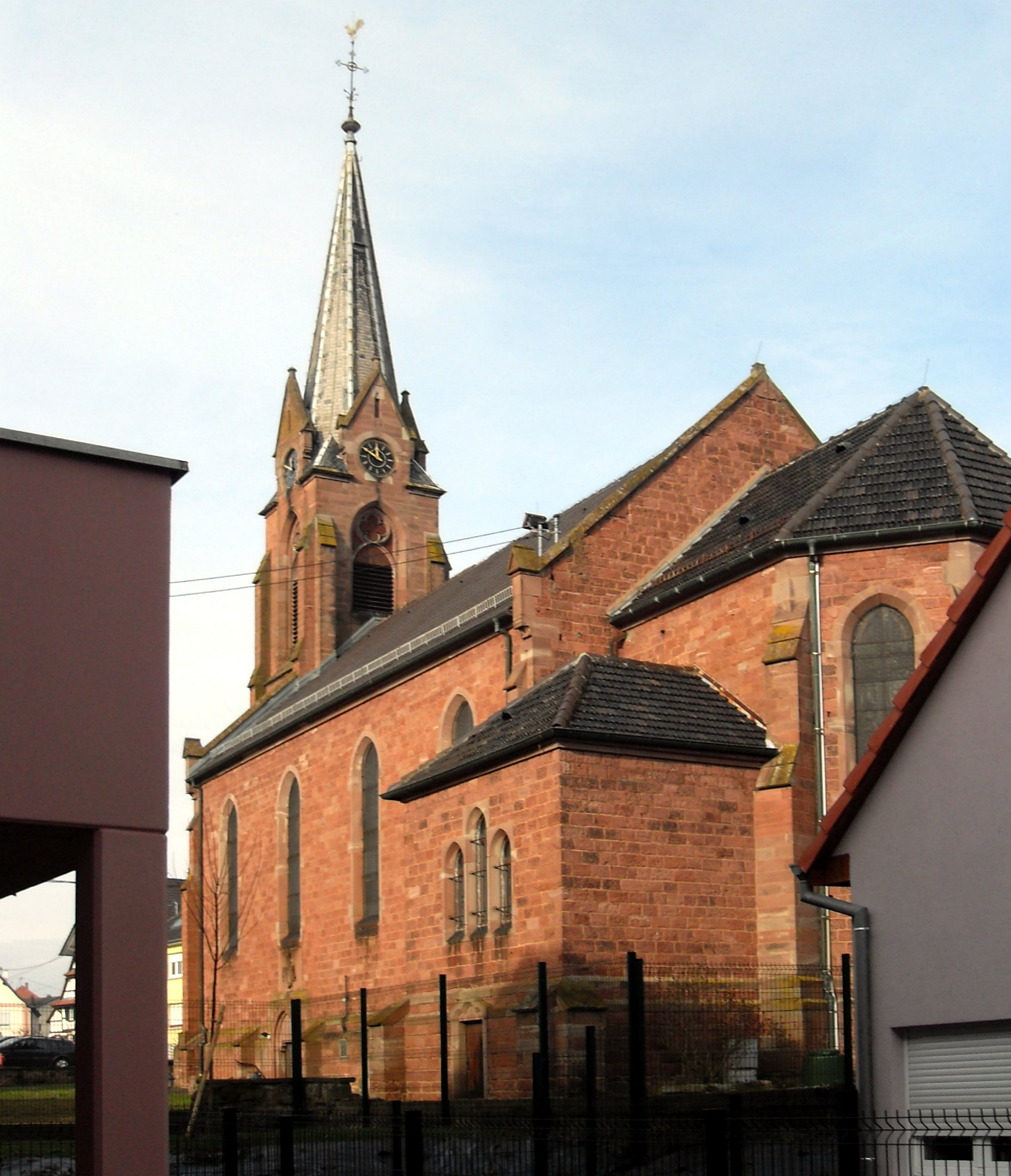 L'église Saint-Arbogast à Geudertheim